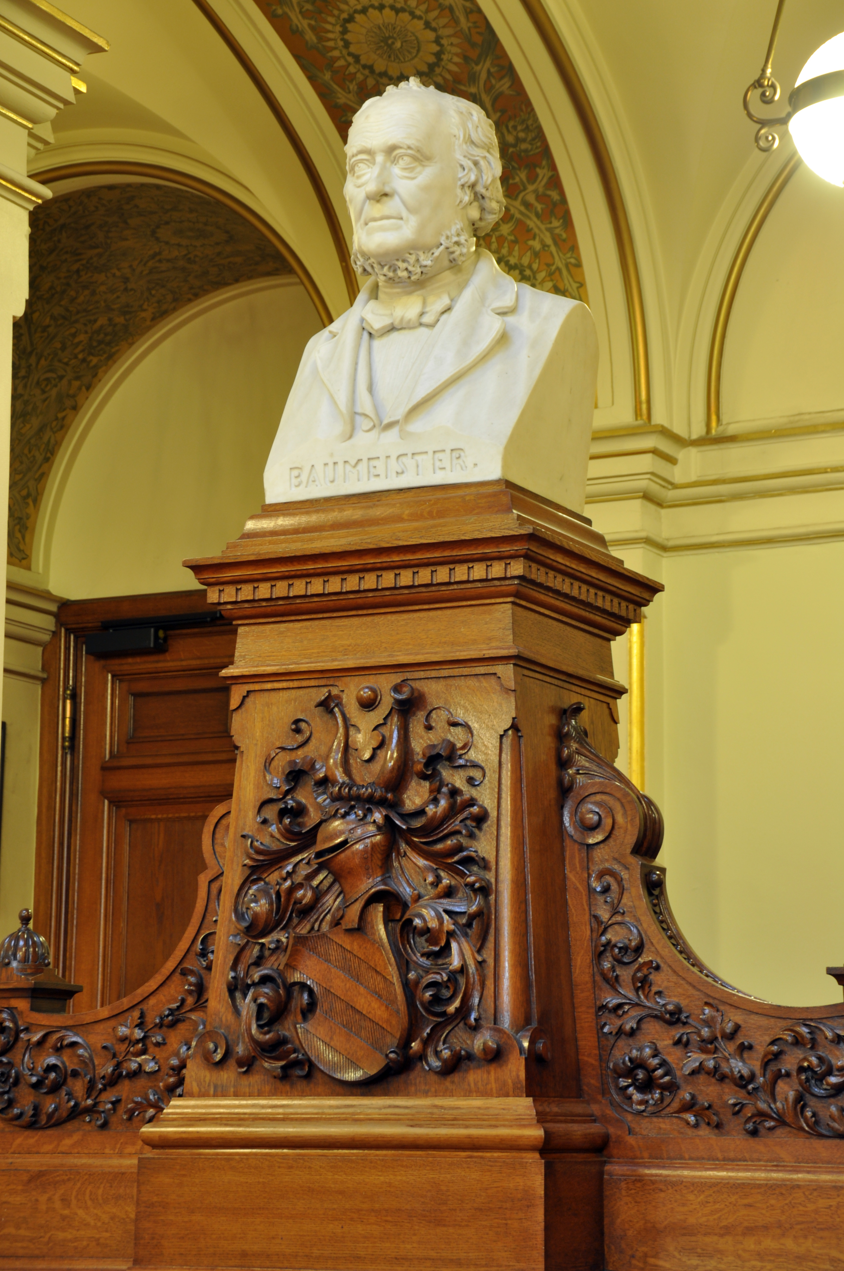 WikiProjekt Hamburgische Bürgerschaft. 22./23. 6. 2011 Fotos aus dem Rathaus. Die Büste zeigt den früheren Bürgerschaftspräsidenten Hermann Baumeister und steht heute im Bürgersaal des Hamburger Rathauses. Sie wurde 1877 von Engelbert Pfeiffer geschaffen. This is a photograph of an architectural monument.